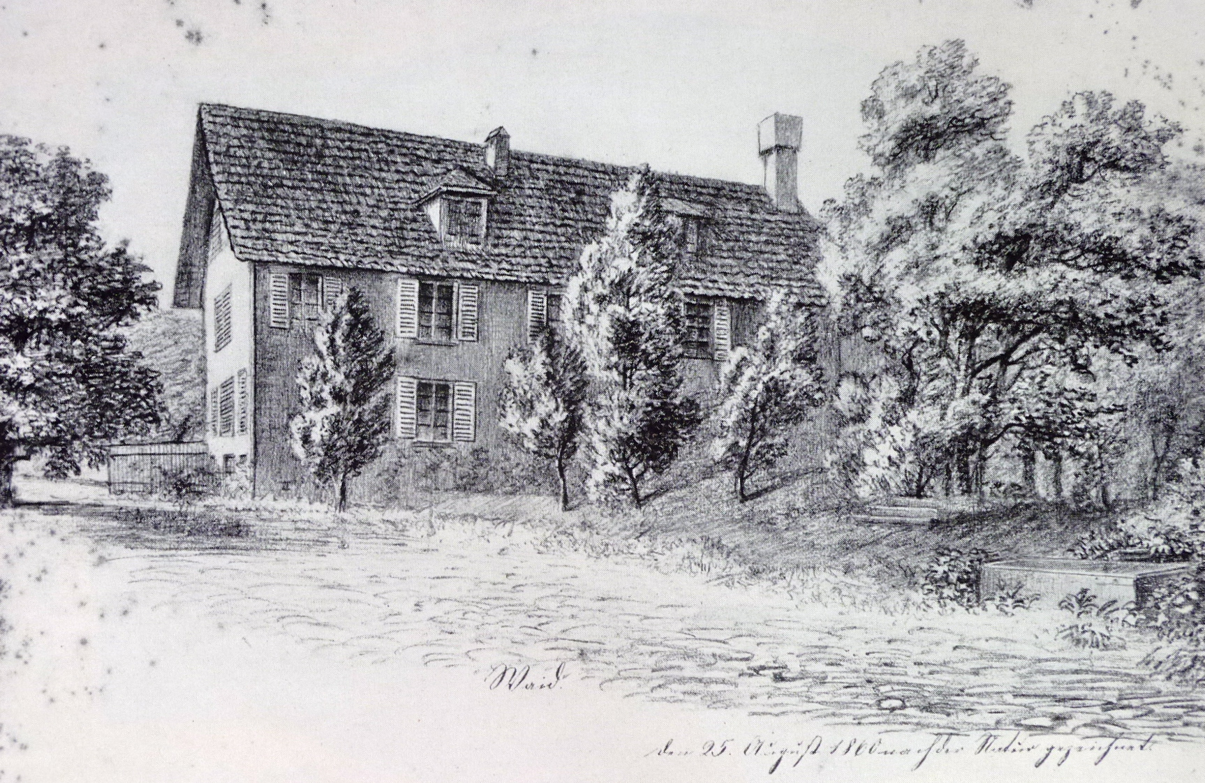 Johann Rudolf Rahn Landhaus Waid; Zeichnung von Caroline Rahn